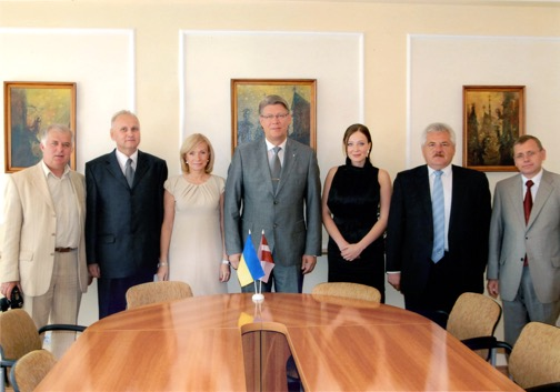 Президент Латвійської Республіки Валдіс Затлерс в актовій залі Почесного консульства Латвії у м. Львові, 27 червня 2008 року. На фото (зліва направо): український фотохудожник Василь Пилип'юк, Почесний консул Латвійської Республіки Володимир Гарцула, дружина Президента Латвії Ліліта Затлерс, Президент Латвійської Республіки Валдіс Затлерс, дружина Почесного консула Латвійської Республіки Олена Гарцула, Міський голова Жовкви Євген Янушевич, Міський голова Пустомит Володимир Кардаш.